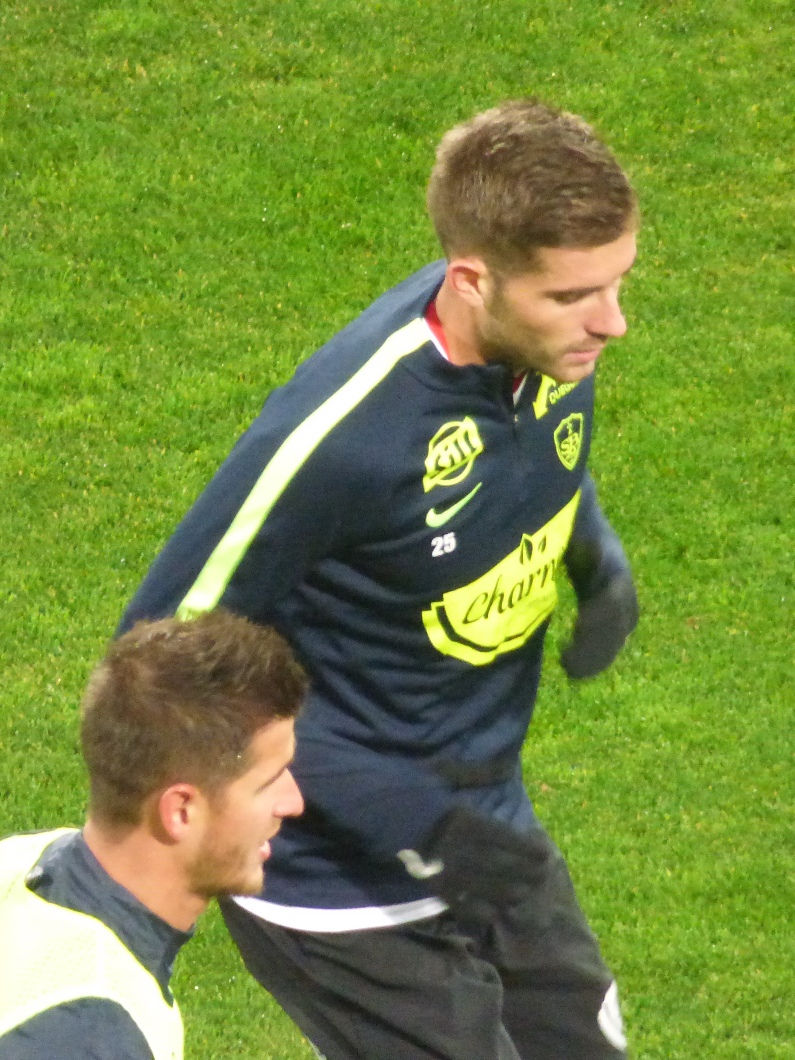 Corentin Jacob avant le match RC Lens / Stade brestois, le 4 décembre 2018, comptant pour la dix-septième journée du championnat de France de football de Ligue 2 2018-2019, au Stade Bollaert-Delelis.